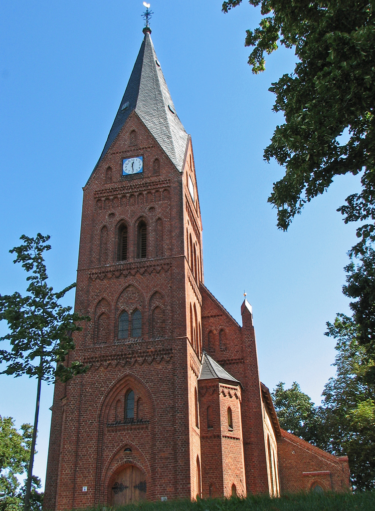 Beschreibung: Kirche Sankt Bartholomäus / Ribnitz-Damgarten / OT Damgarten Fotograf: Darkone, 1. September 2005